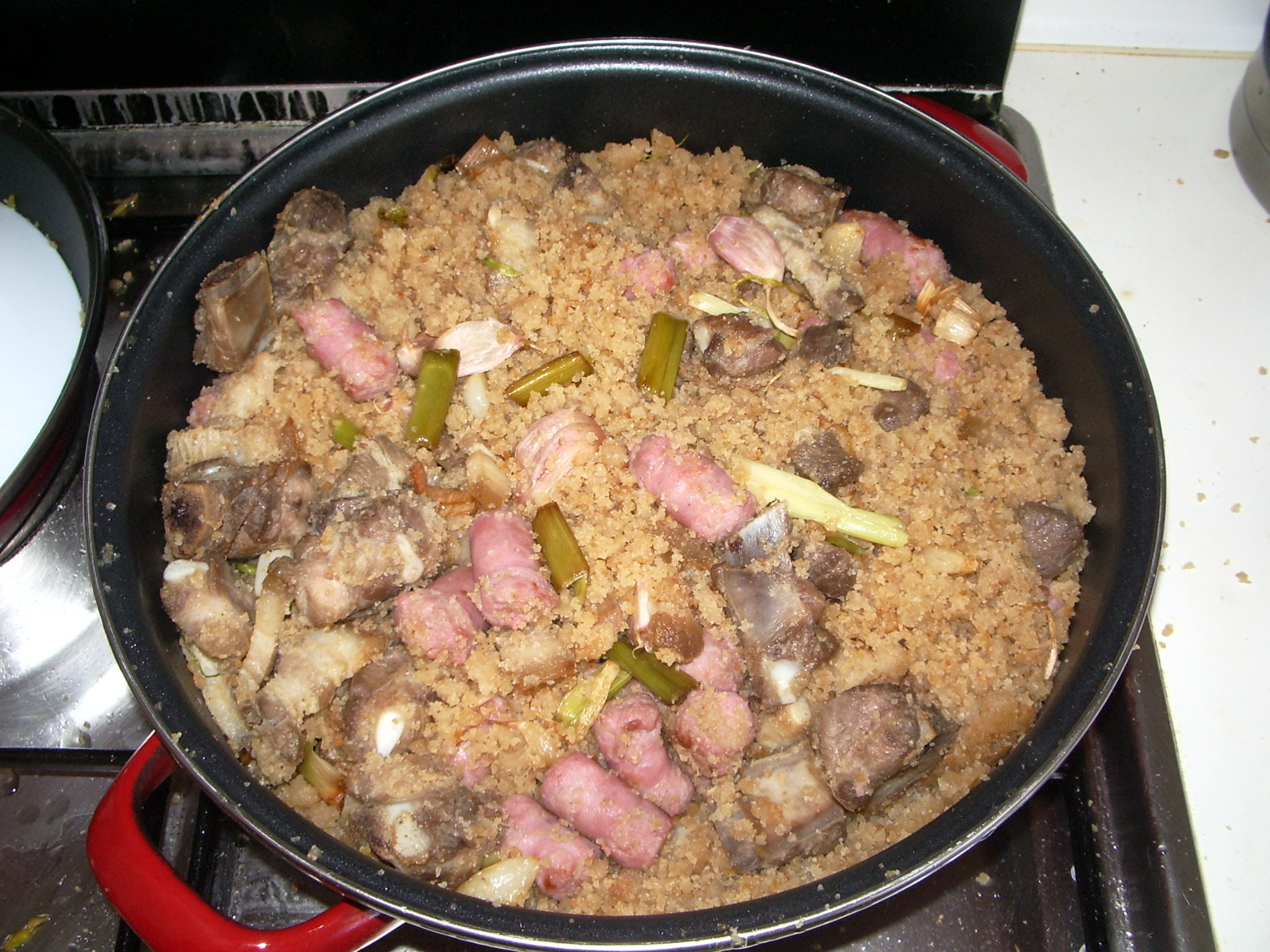 Migas ruleras. Plato habitual de la cocina manchega y murciana, entre otras, a base de pan duro remojado, ajos, aceite, longaniza, tocino y otros ingredientes de cerdo. Se suele mezclar el pan remojado con harina.